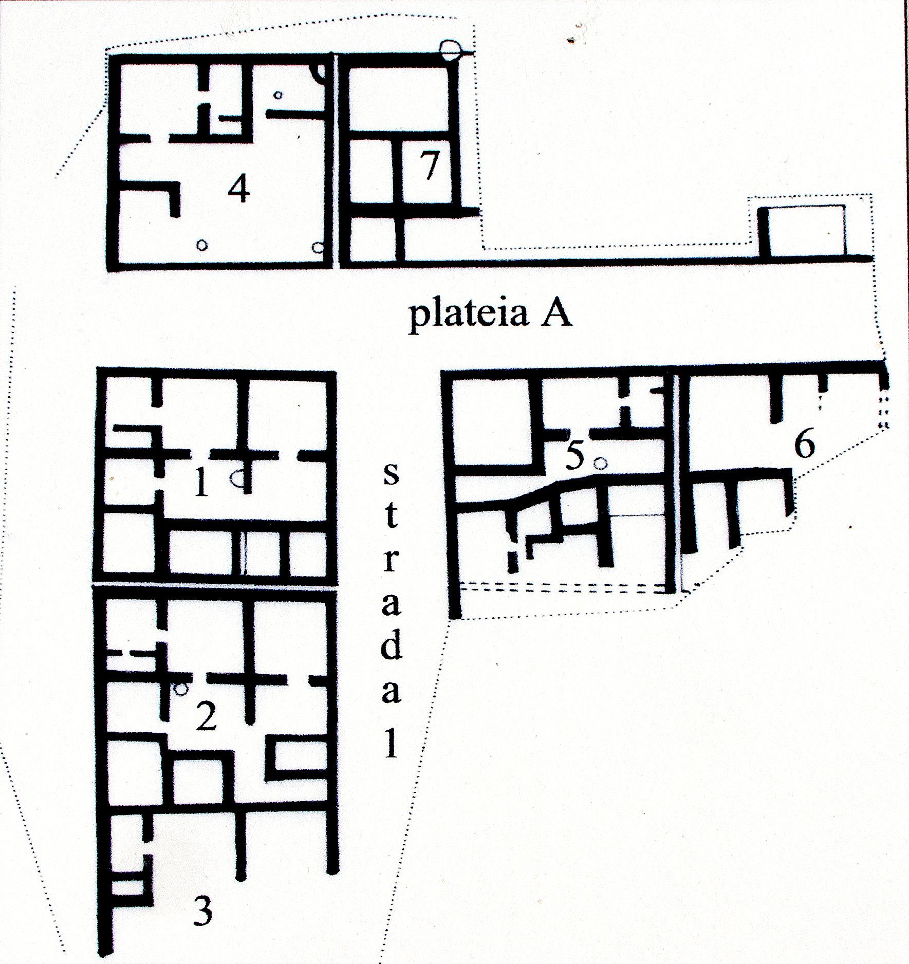 mappa di uno degli ambienti dell'acropoli di Licata